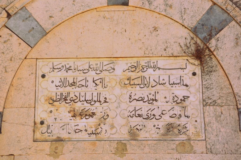 Pavillon de la Sabbala, construit en 1208 de l'Hégire, La Manouba